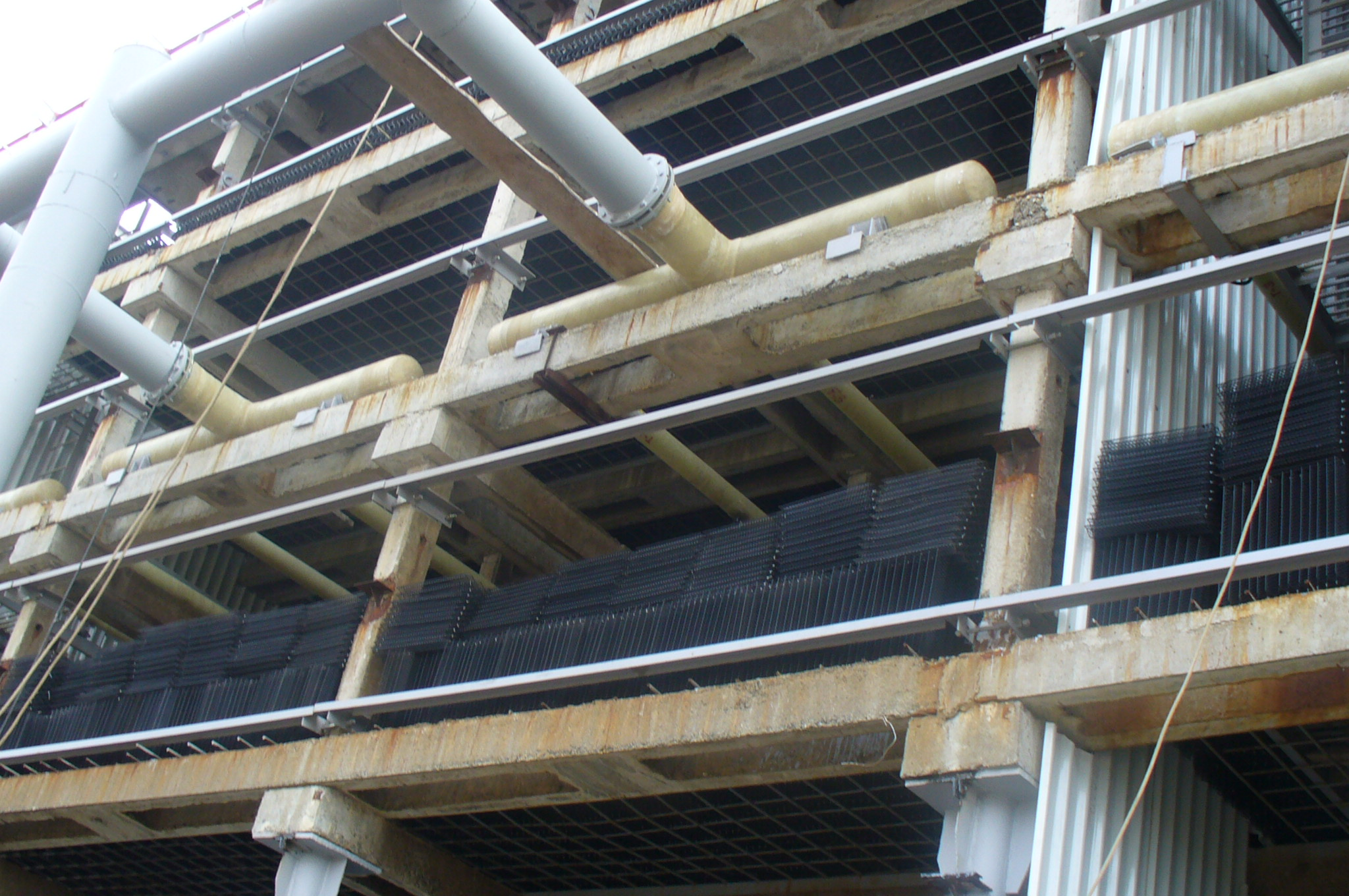 Ороситель БНС 5.5.5. капельно-плёночный установленный на градирне